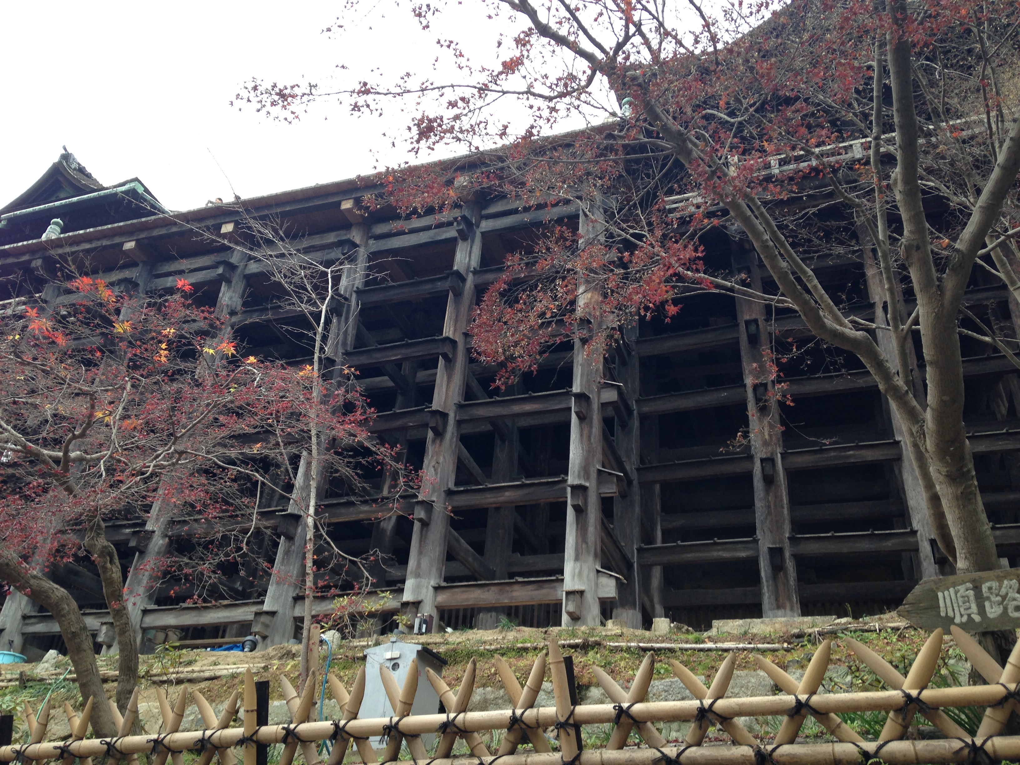 下より望む清水寺の舞台